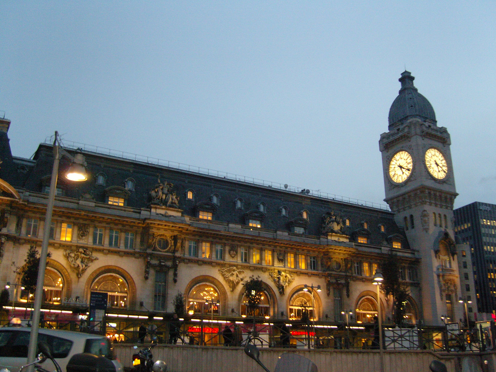 Nádraží Gare de Lyon v Paříži